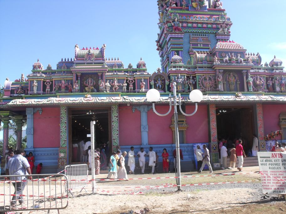 Fronton du Kovil Narassigua Péroumal de Saint Pierre de La Réunion le lundi 24 mai 2010.